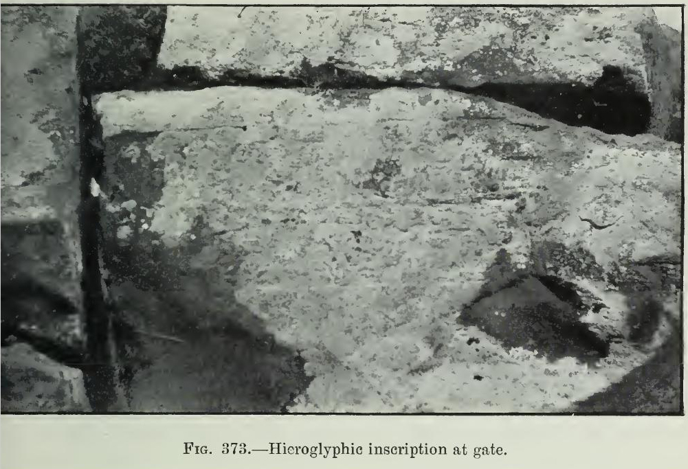 Inschrift Kızıldağ 4 beim Felsrelief von Kızıldağ nördlich von Karaman in der Südtürkei